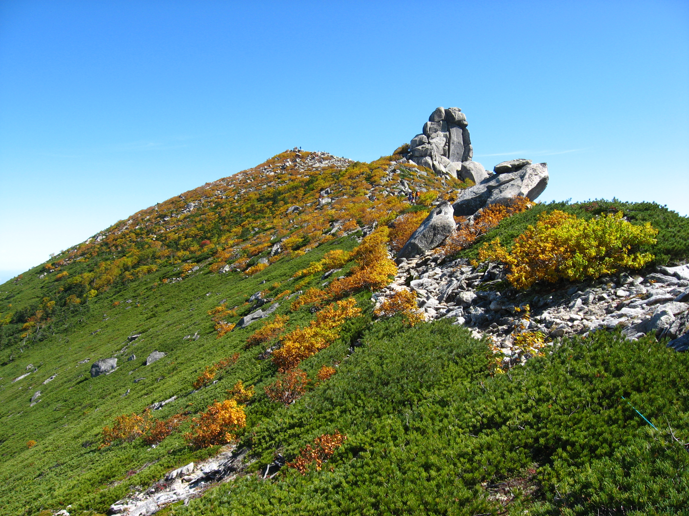 西側から見た金峰山